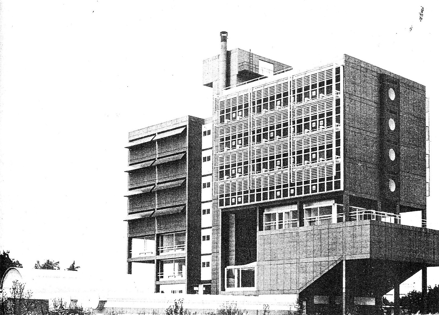 Edificio del Instituto de Investigaciones Científicas de la Universidad Nacional de La Plata. Arquitectos: Baudizzone-Erbin-Lestard-Varas (1968).